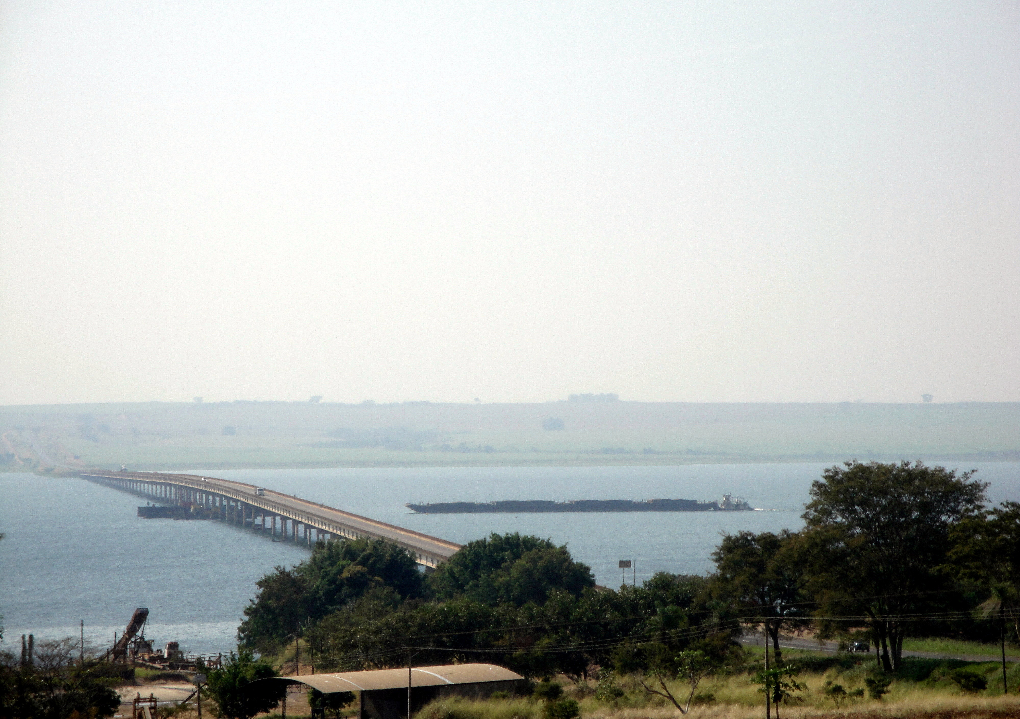 Ponte Engenheiro Gilberto Paim Pamplona (Rodovia SP-333), sobre o Rio Tietê (Hidrovia Tietê-Paraná), com 2,4 km de extensão. Município de Pongaí, SP, Brasil.